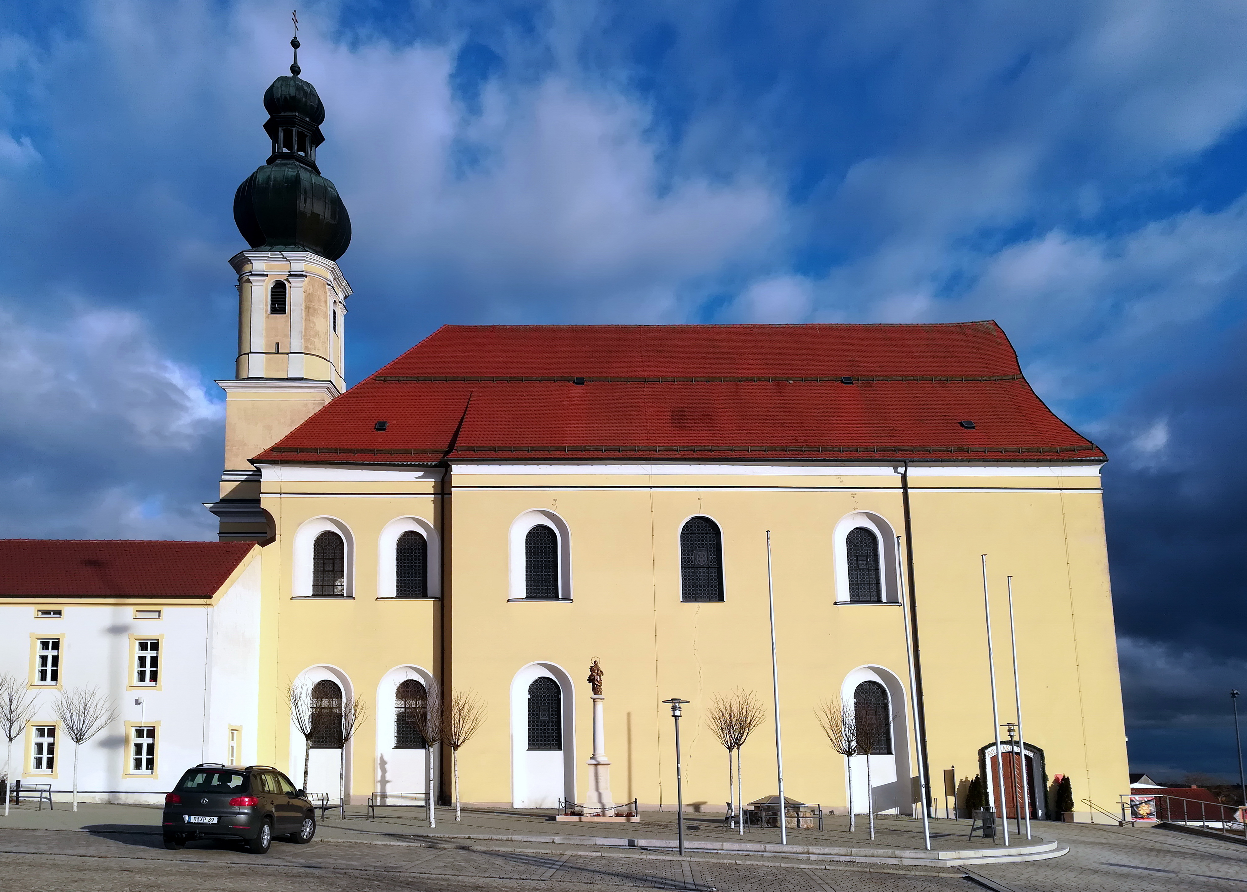 Die Wallfahrtskirche Maria Schnee ist eine Rokokokirche in Aufhausen.